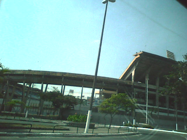 Foto do Estádio Fonte Nova, Salvador, Bahia, Brasil.